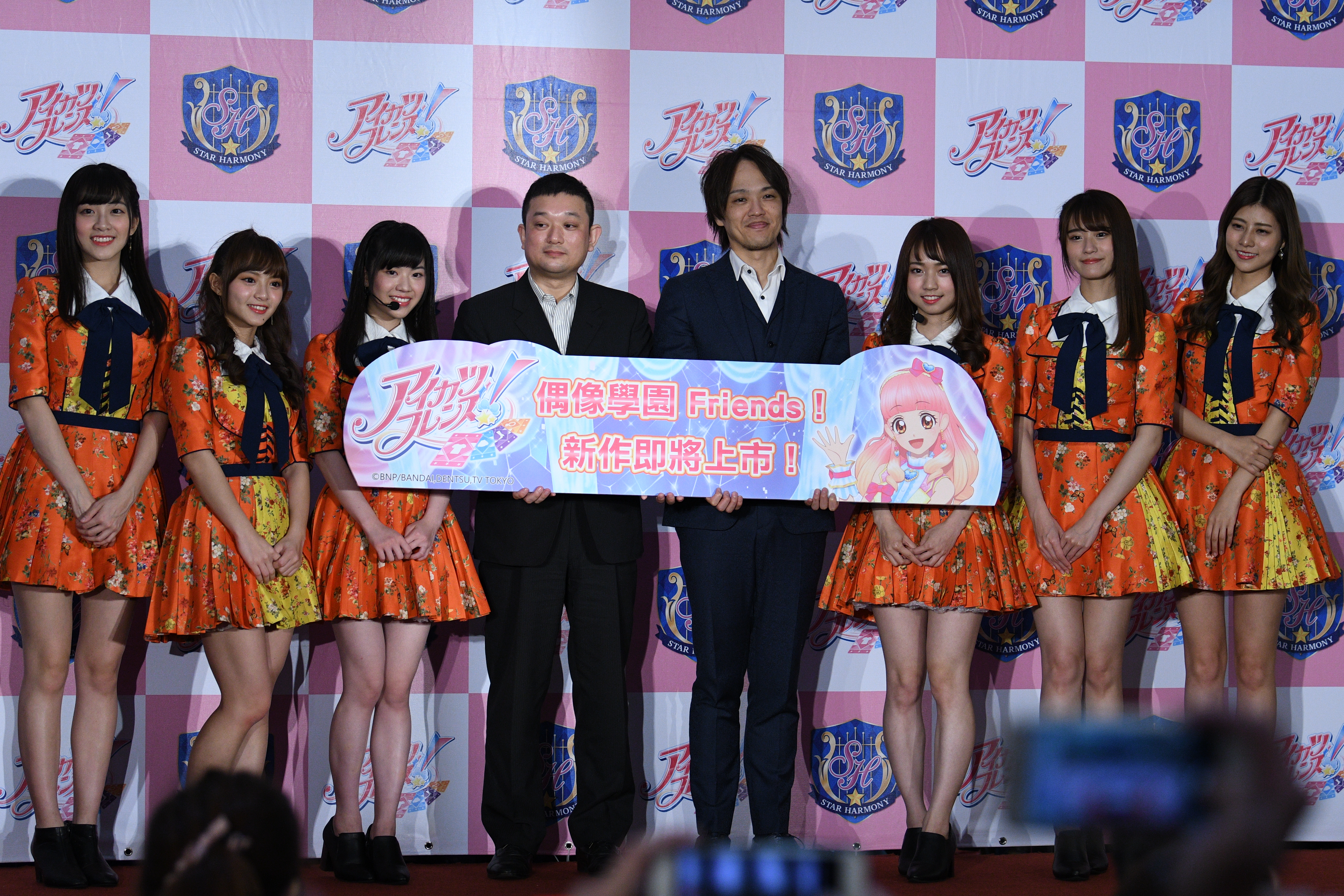 2019.01.05 偶像學園 Friends！ AKB48 Team TP @中和Global Mall環球購物中心 1300